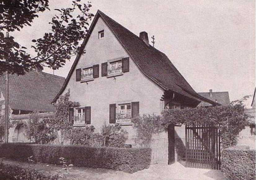 Otto Leitolf Obernauer Kolonie Dankwartstraße Aschaffenburg (1927)